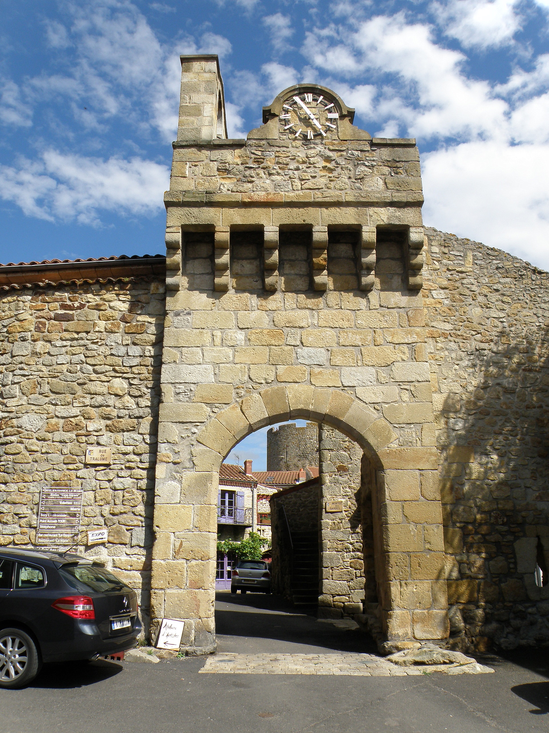 Montpeyroux (Puy-de-Dôme). Porte fortifiée (XIVe siècle), face ouest. Le donjon est en partie visible sous l'arcade.